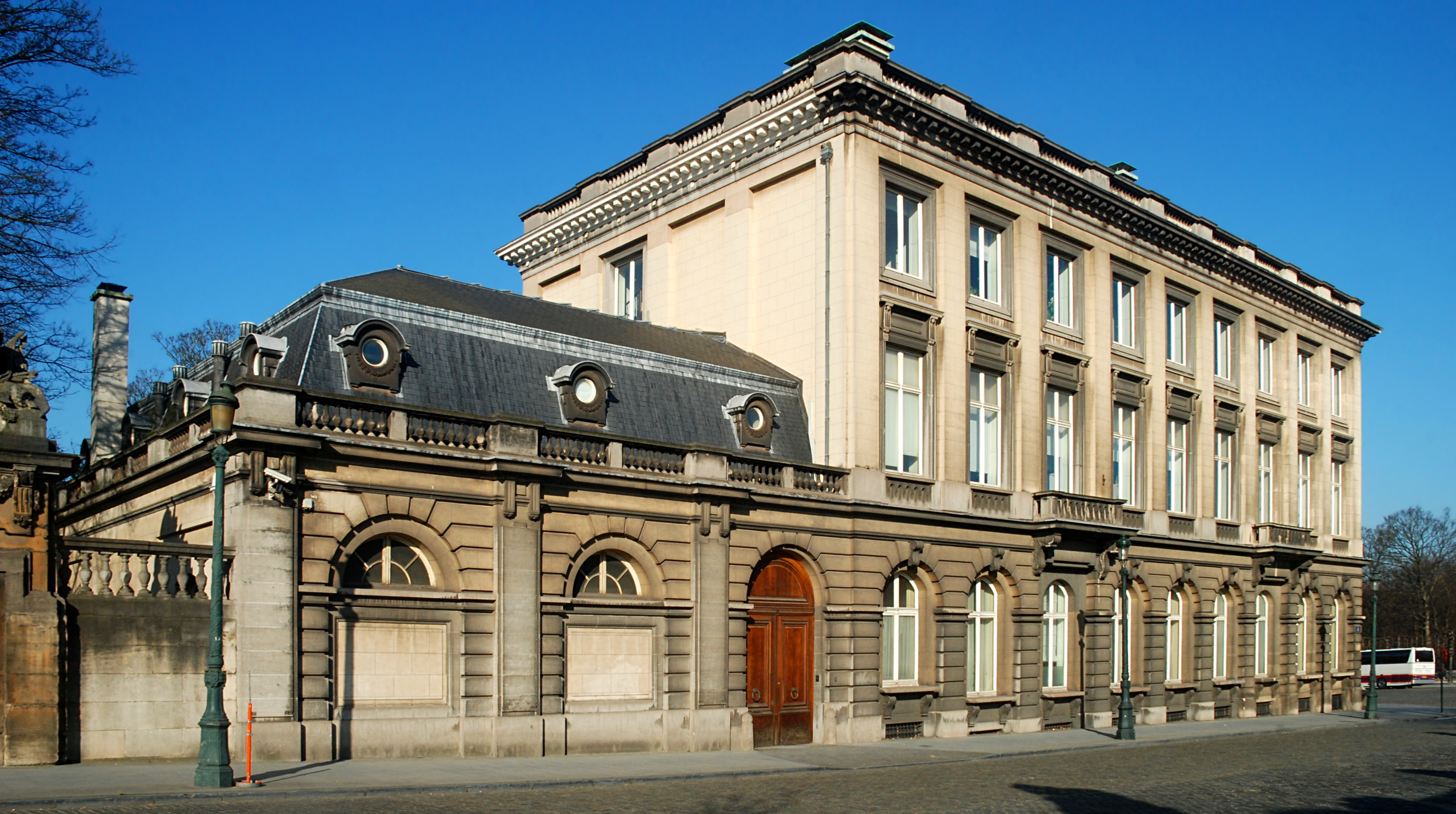 Belgique - Bruxelles - Hôtel de la Liste civile